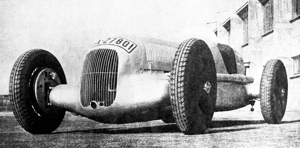 Mercedes-Benz W 25 quatre roues indépendantes, victorieuse au Nürburgring en 1934.